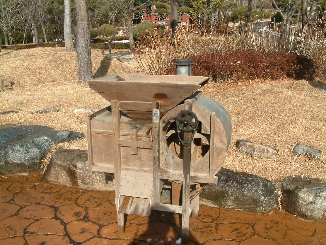 탈곡된 벼에서 불순물을 걸러내는 풍구